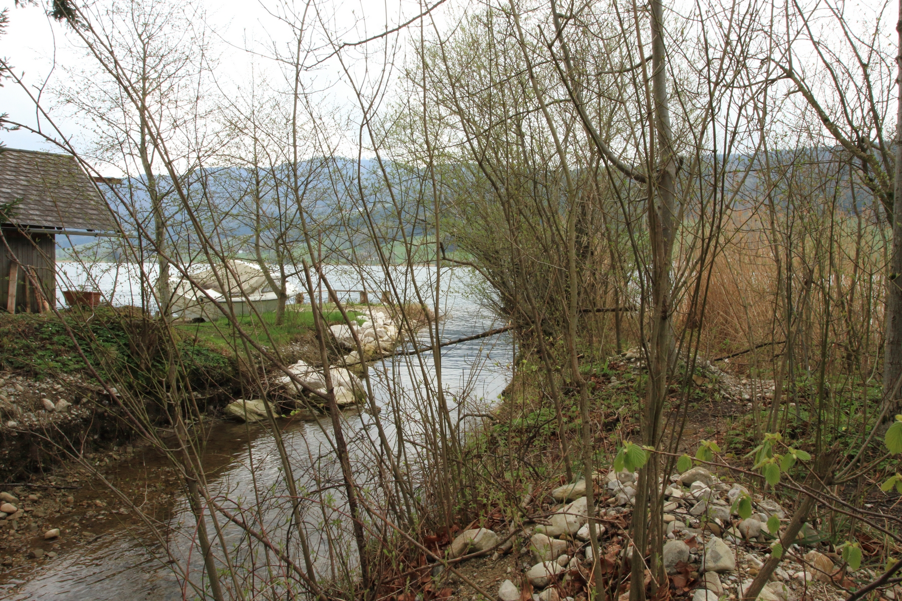 Mündung des Zeller Baches in den Irrsee